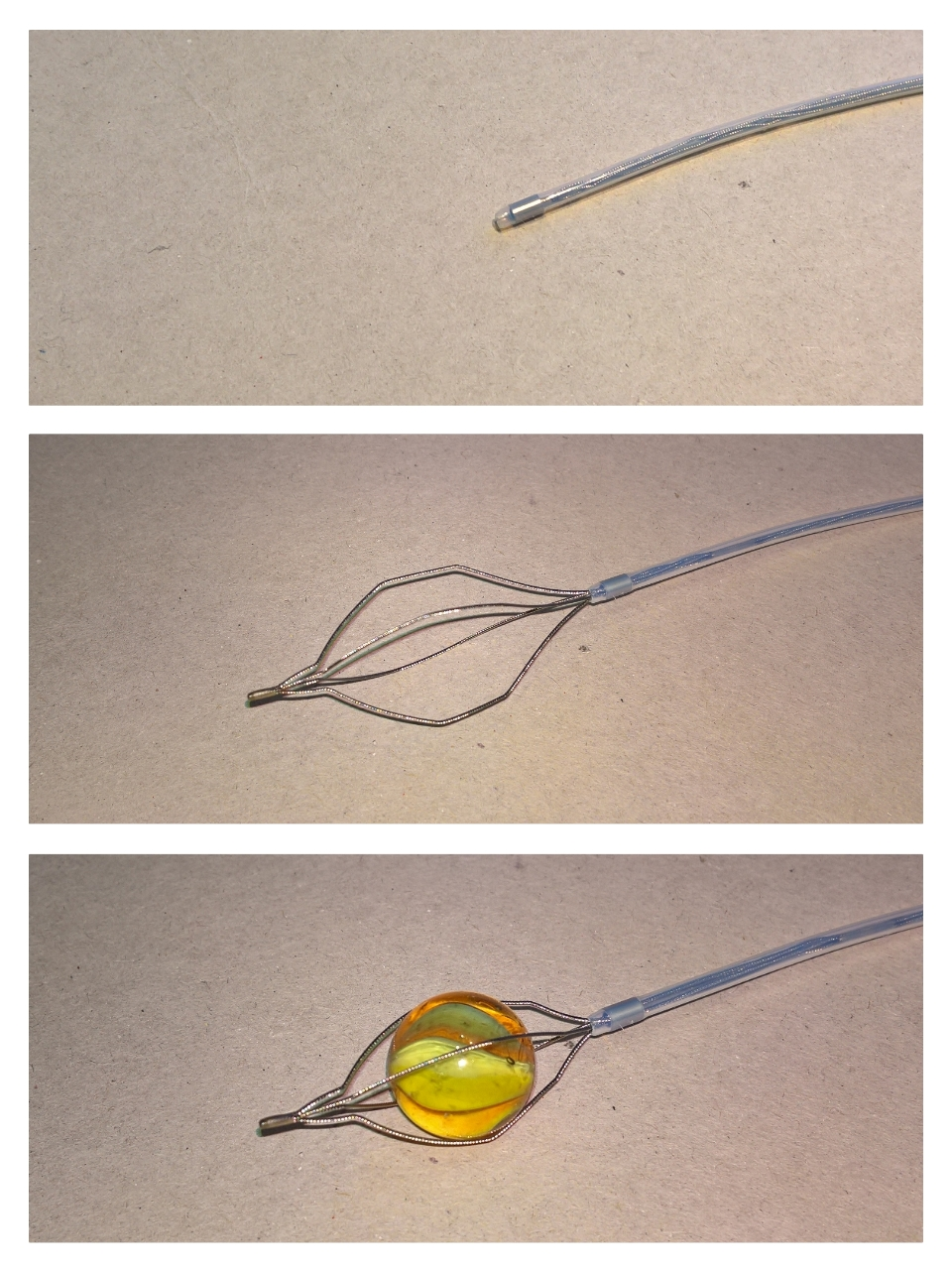 Dormia-Körbchen eingefahren im Katheter, Dormia-Körbchen ausgefahren und entfaltet, Dormia-Körbchen mit "eingefangenem" Fremdkörper.